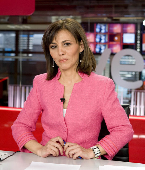 ANGELES BRAVO